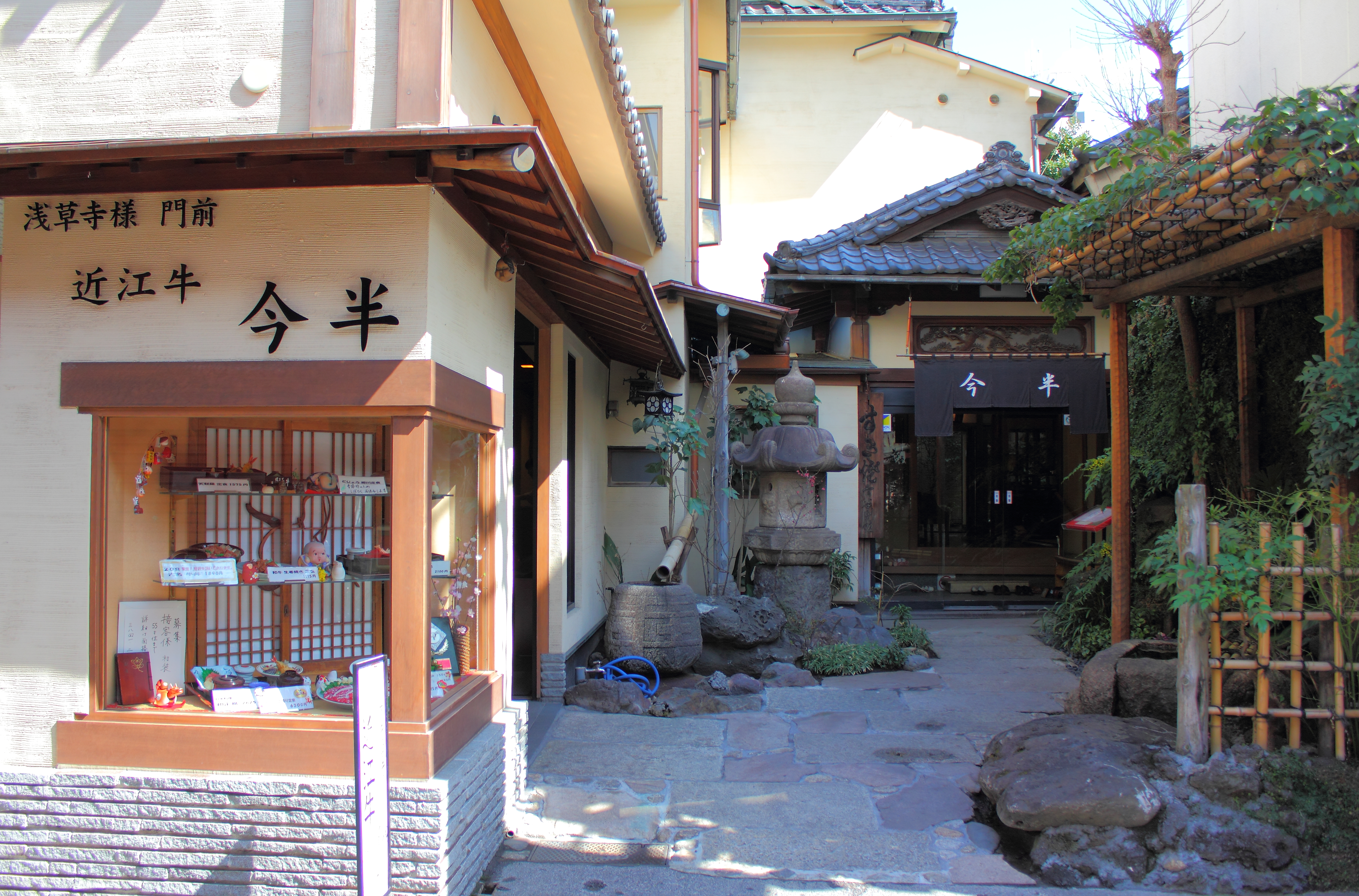 今半別館（国登録有形文化財）。東京都台東区。